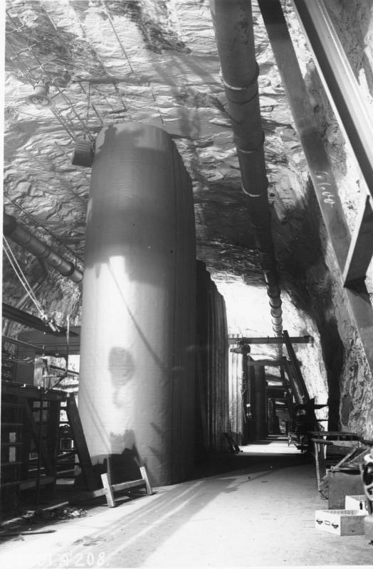 G8501 A 208